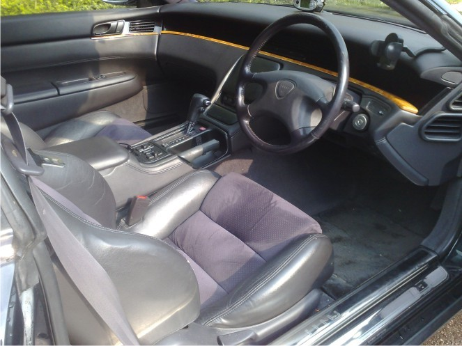 Cockpitansicht Fahrerseite. Fahrzeug wurde nur als Rechtslenker gebaut. Das ist die "Sport"-Version.